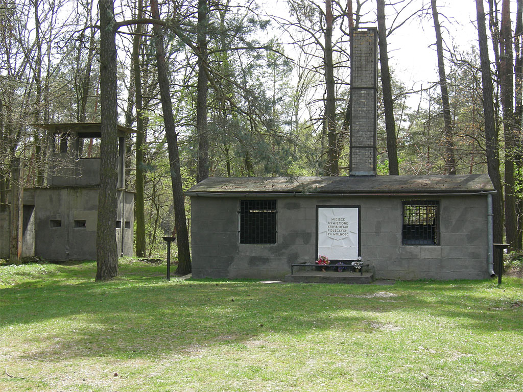 lager - Blechhammer. Four crématoire.